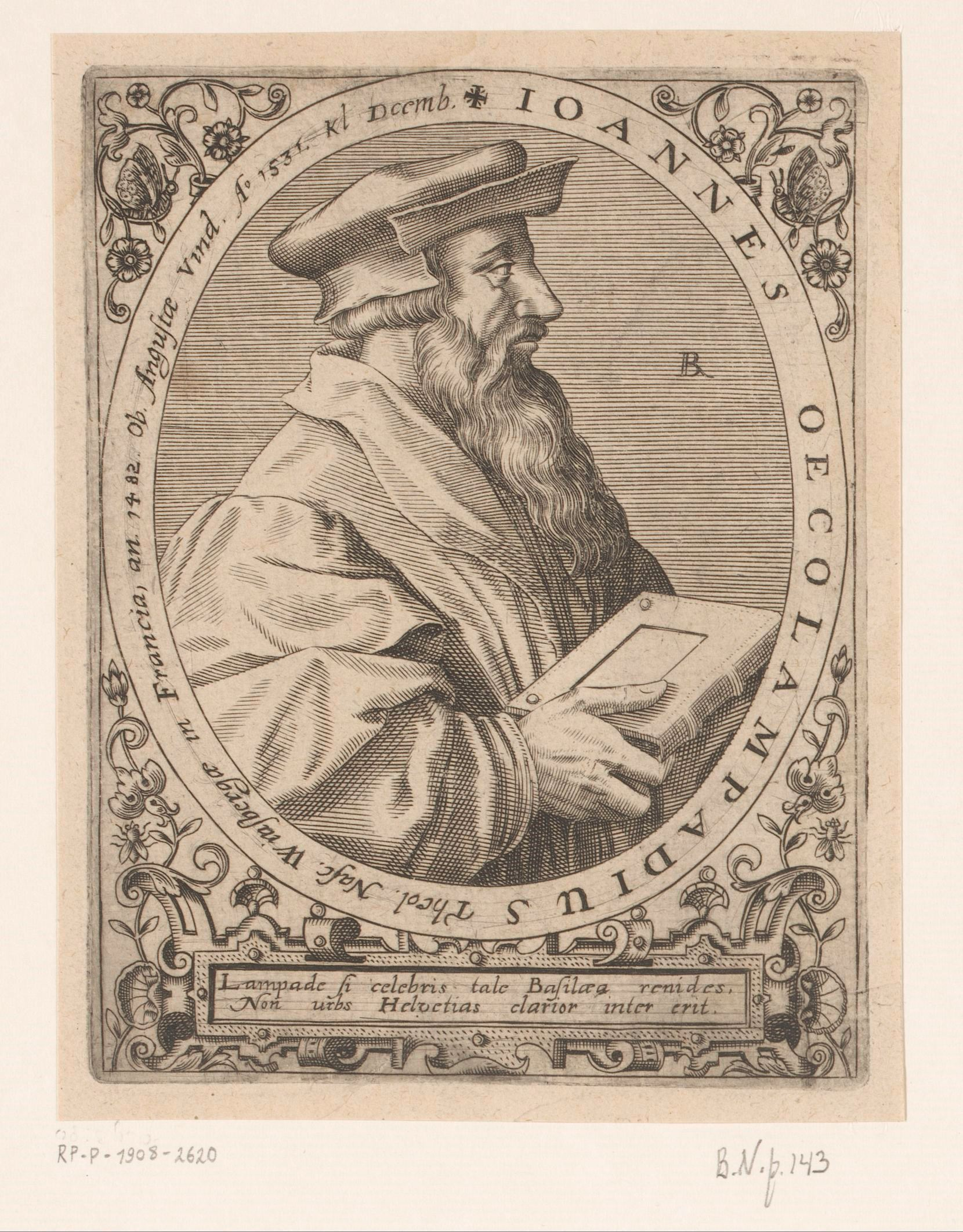 IdentificatieTitel(s): Portret van Johannes OecolampadiusJoannes Oecolampadius Theol. (...) (titel op object)Serie portretten van vijftiende- en zestiende-eeuwse geleerden (serietitel)Objecttype: prent Objectnummer: RP-P-1908-2620Catalogusreferentie: LeBlanc 139Opschriften / Merken: verzamelaarsmerk, verso, gestempeld: Lugt 2228VervaardigingVervaardiger: prentmaker: Robert Boissard (vermeld op object)prentmaker: Johann Theodor de Bry (verworpen toeschrijving)Plaats vervaardiging: FrankrijkDatering: 1597 - 1599Materiaal: papier Techniek: graveren (drukprocedé)Afmetingen: plaatrand: h 139 mm × b 106 mmToelichtingMogelijk prent uit: Boissard, Jean-Jacques; Bry, Theodoor de; e.a. Bibliotheca sive thesaurus virtutis et gloriae in quo continentur illustrium eruditione et doctrina virorum effigies et vitae (...). Frankfurt: Guilielmi Fitzeri, 1628.OnderwerpWat: historical personsbookinsects: butterflyinsects: flyWie: Johannes OecolampadiusVerwerving en rechtenVerwerving: aankoop 1905Copyright: Publiek domein